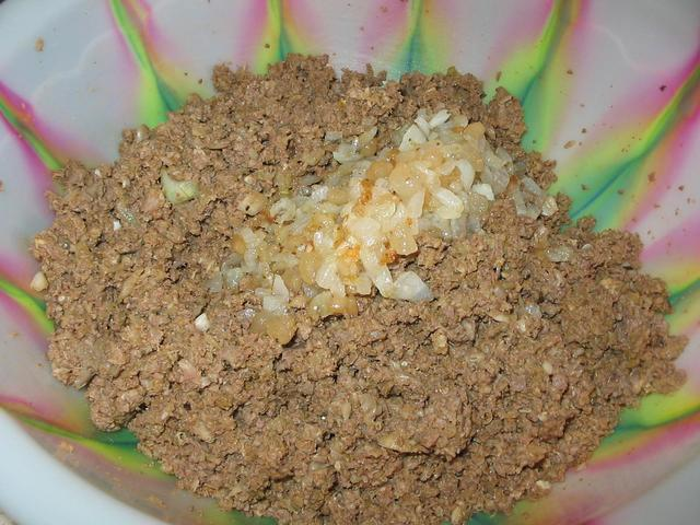 начинка з ліверу для вареників. відварені волове серце, легені та печінка, змолоті і заправлені смаженою цибулею